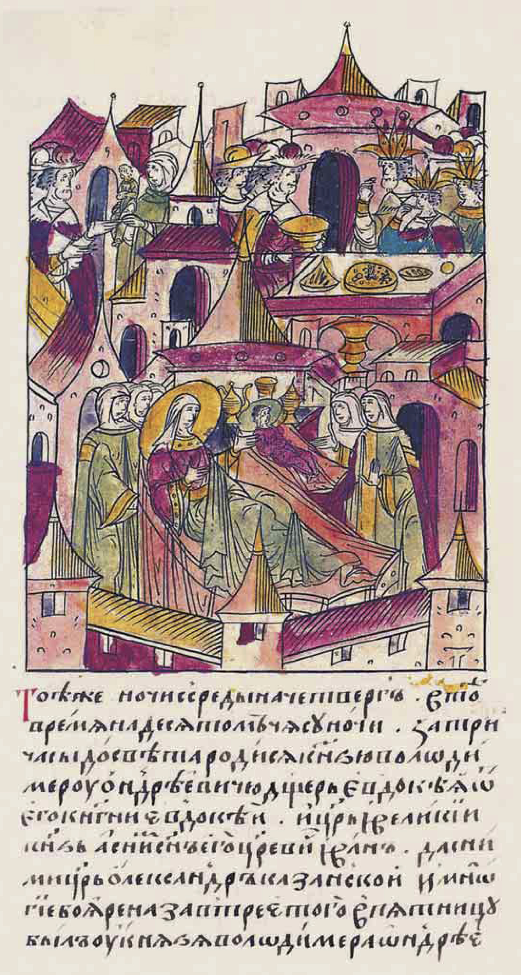 Лицевой летописный свод "Той же ночью со среды на четверг, в то же время, на десятом часу ночи, за три часа до рассвета, родилась у князя Владимира Андреевича дочь Евдокия от его княгини Евдокии. И царь и великий князь, а с ним сын его царевич Иван, да с ними царь Казанский Александр и многие бояре на следующий день в пятницу были у князя Владимира Андреевича [на его радости, и порадовались с ним, и овощи вкушали]".